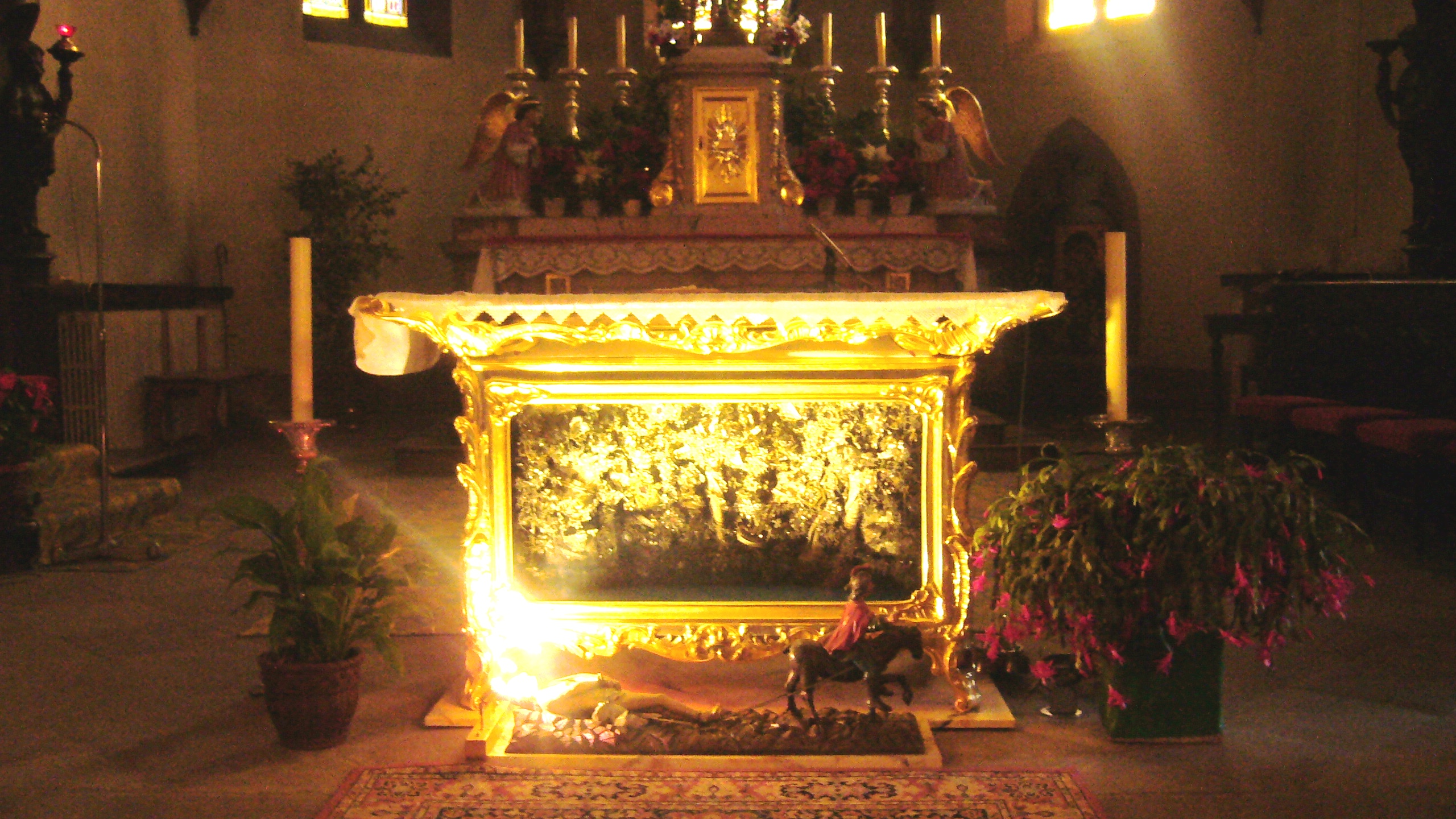 Châsse de Saint-Hippolyte 022.JPG